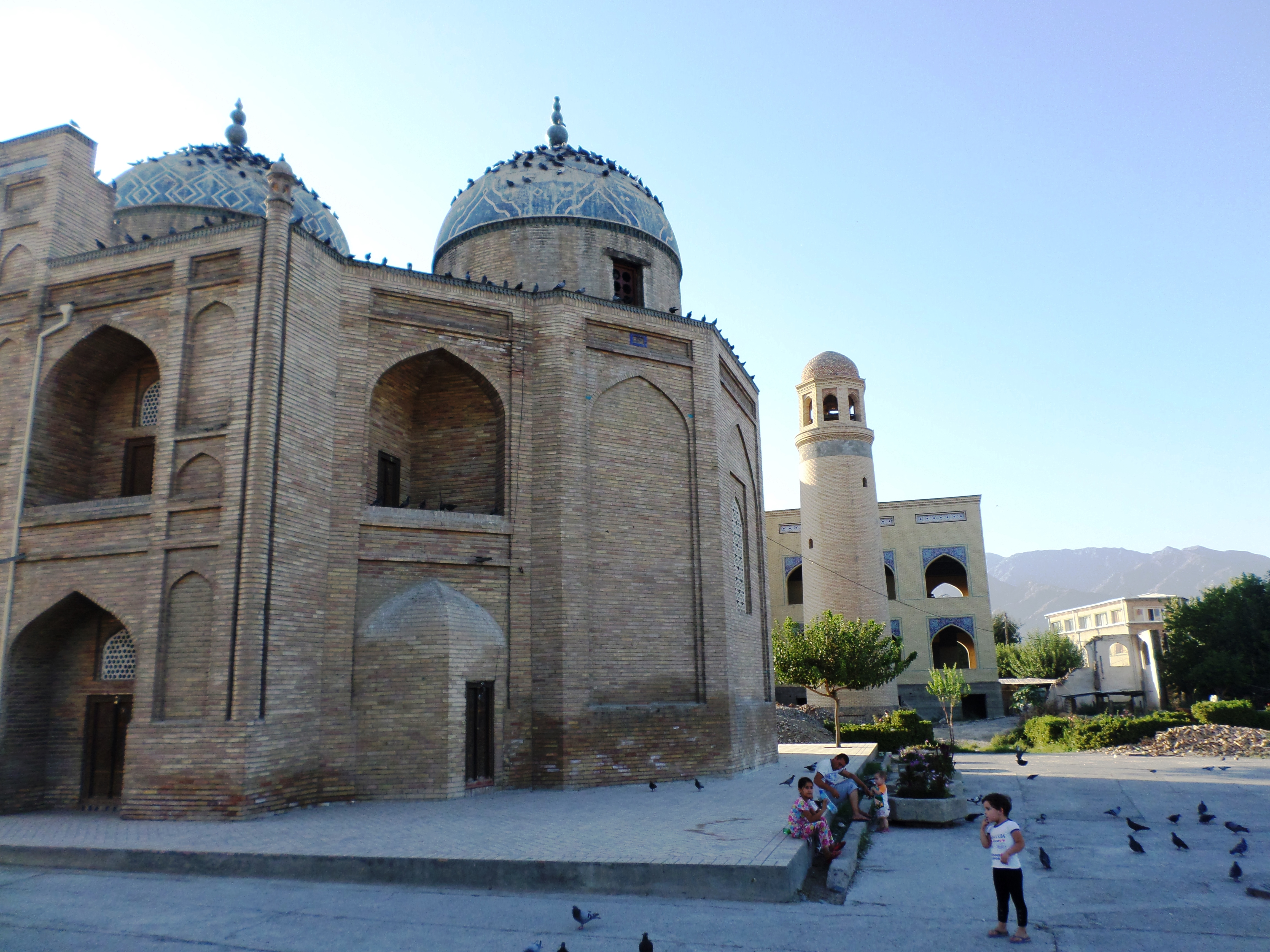 Площадь, мечеть-мавзолей шейха Муслихиддина (XVII—XVIII вв.), г. Худжанд